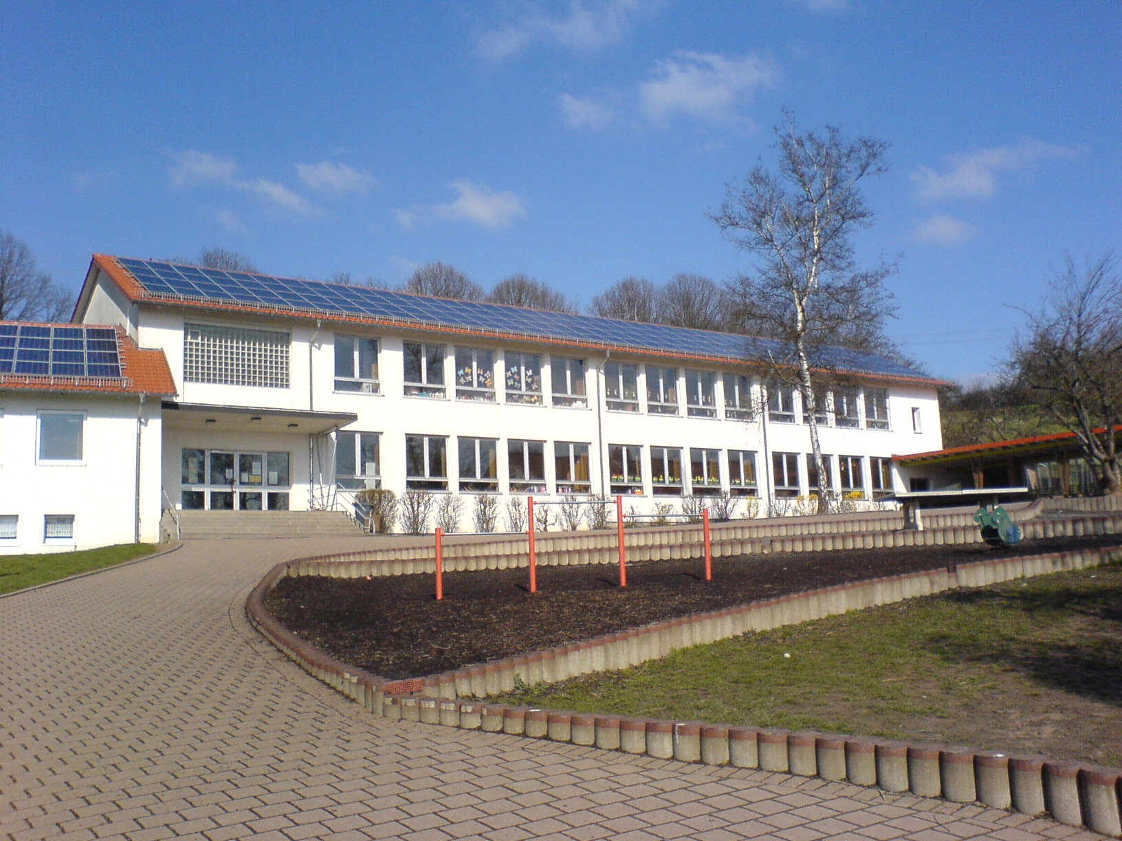 Ottweiler (Saar) Neumuenster Grundschule